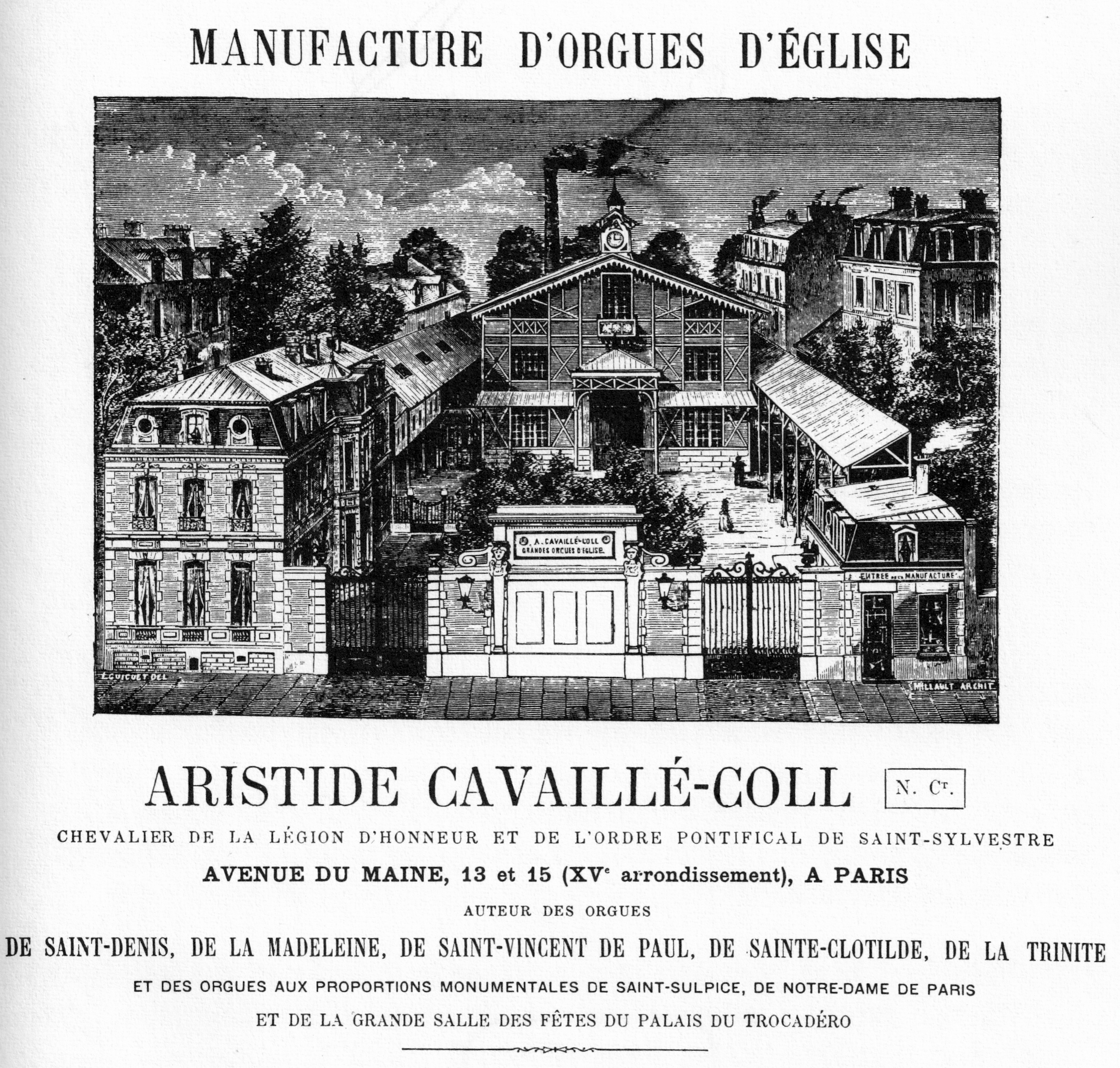 Illustration de l'hôtel particulier et des ateliers d'Arisitide Cavaillé-Coll, vue depuis l'Avenue du Maine. Légende: "Manufacture d'Orgues d'Église Aristide Cavaillé-Coll - Chevalier de la Légion d'Honneur et de l'Ordre Pontifical de Saint-Sylestre - Avenue du Maine, 13 et 15 (XVe arrondissement), à Paris - auteur des orgues de Saint-Denis, de la Madeleine, de Saint-Vincent de Paul, de Sainte-Clothilde, de la Trinité et des orgues aux proportions monumentales de Saint-Sulpice, de Notre-Dame de Paris et de la Grande Salle des fêtes du Palais du Trocadéro"